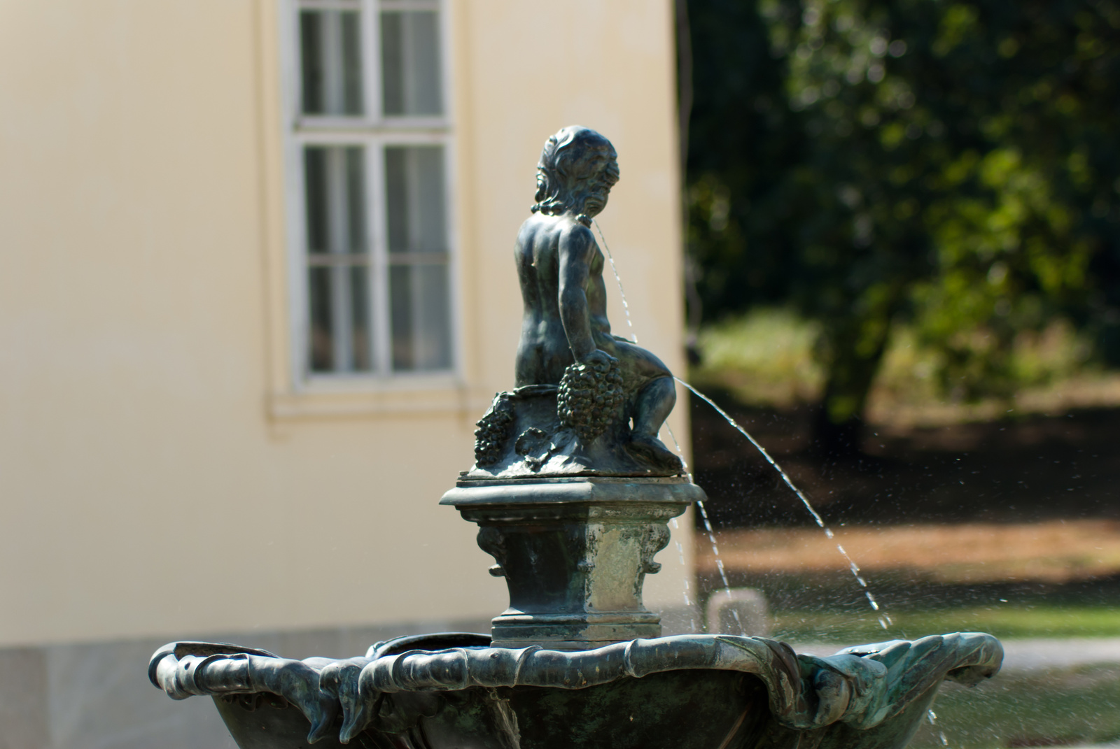 Károlyi-kastély (Fehérvárcsurgó, Petőfi u. 2.) This is a photo of a monument in Hungary, Identifier: 3637